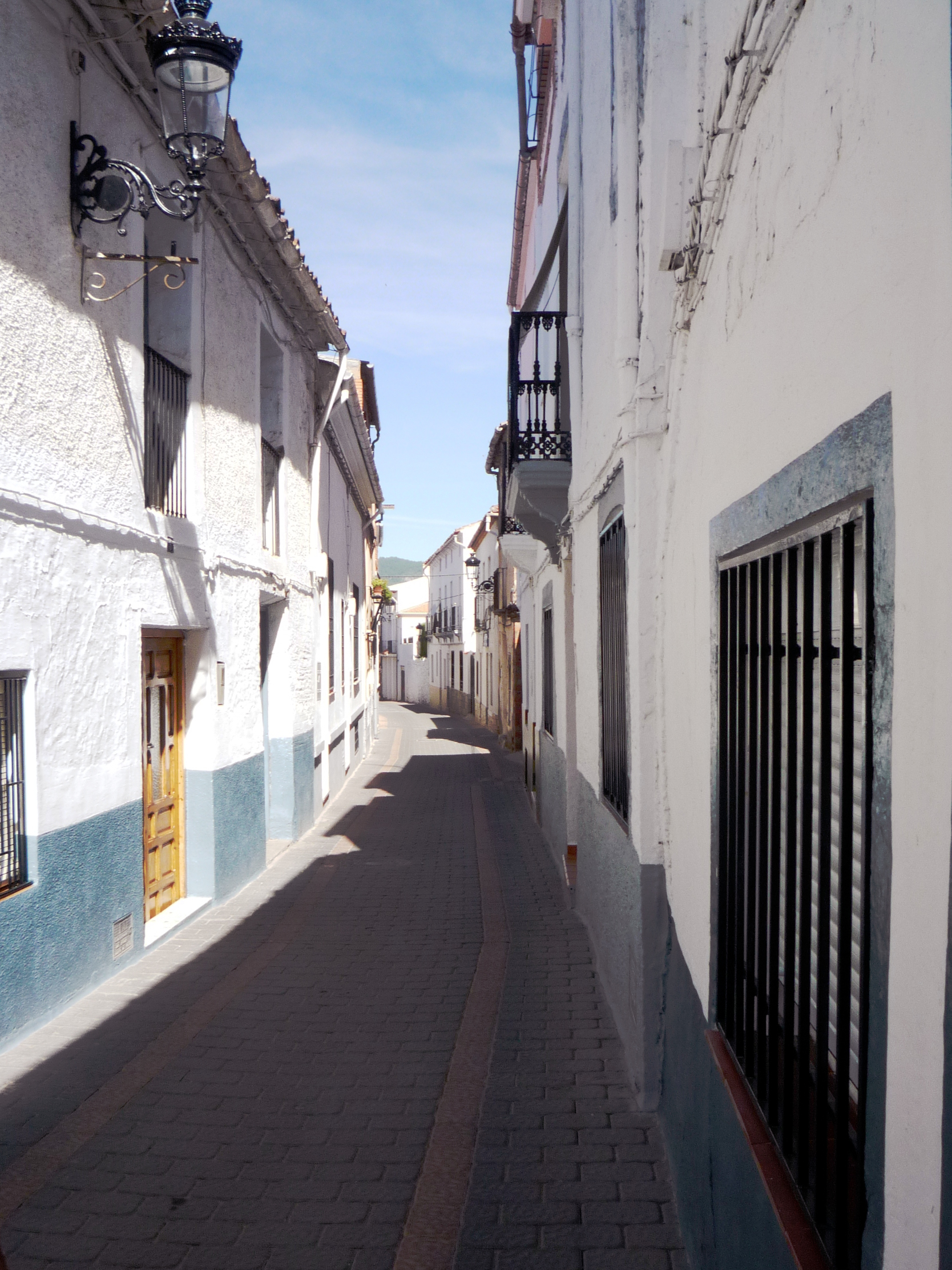 Die "Hauptstraße" von Siles. Die Calle Coso verbindet den Paseo mit dem Ortskern. See more about in a related article (DE) of my travelblog.